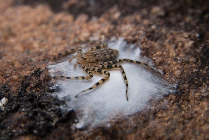 Karaops francesae